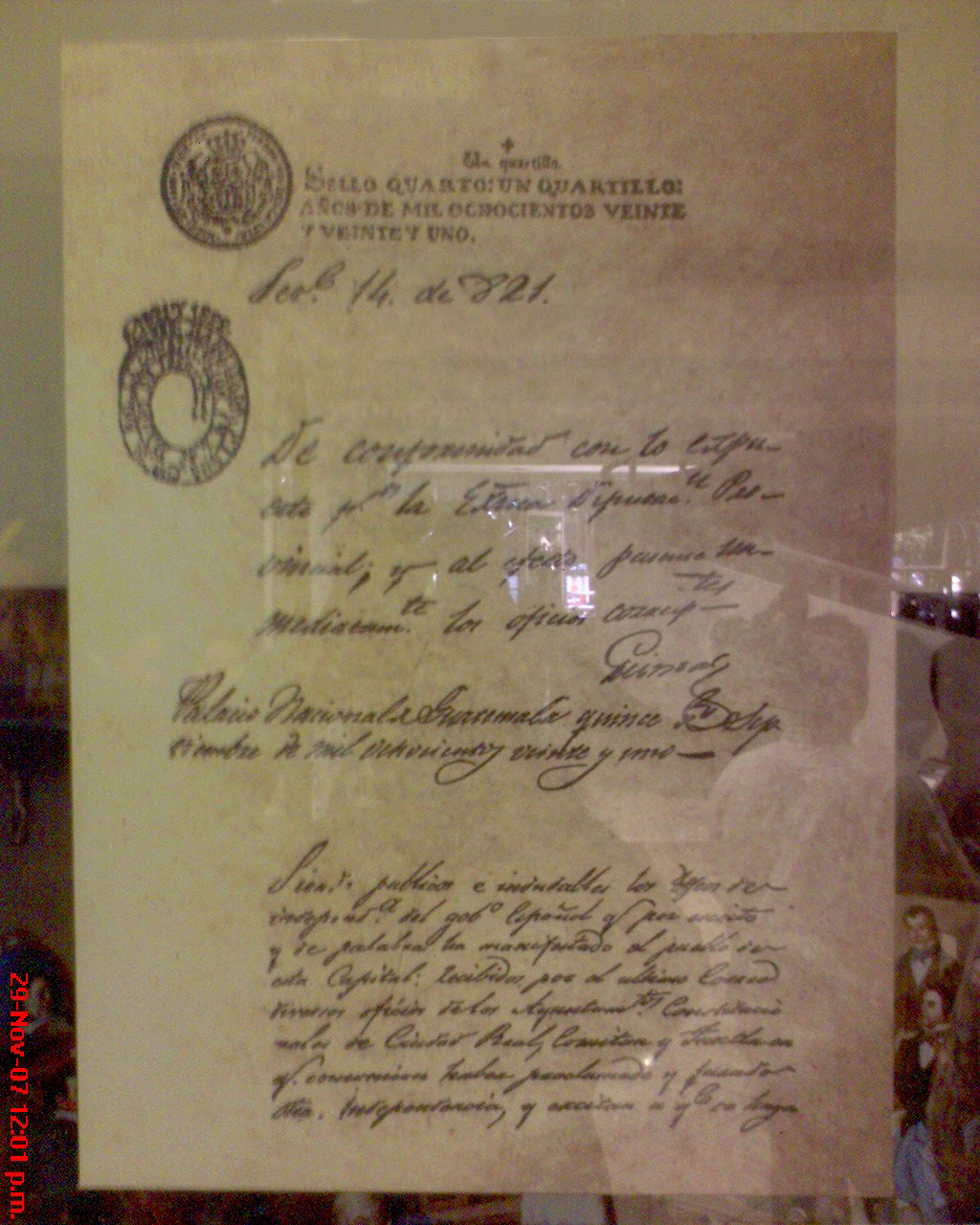 Original del Acta de Independencia Centroamericana que permanece en la Asamblea Legislativa de El Salvador